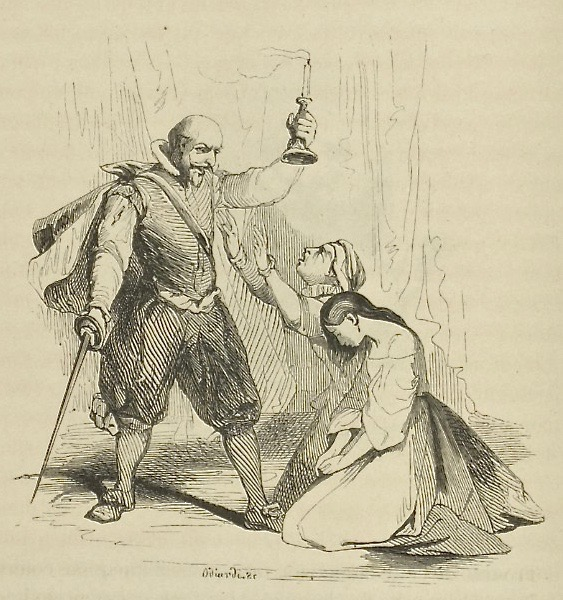 Tony Johannot (1803–1852): Illustration zum Roman Le diable boiteux" (1707) von Alain-René Lesage (1668–1747). Ausgabe von Jules Janin, E. Bourdin, (Paris) 1840, S. 66. Bibliothèque nationale de France. Von links: Don Luis de Cespèdes, Marcelle, Léonor.